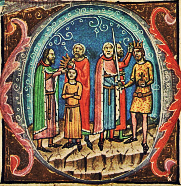 Béla is crowned king after his nephew, Solomon is deprived of the crown